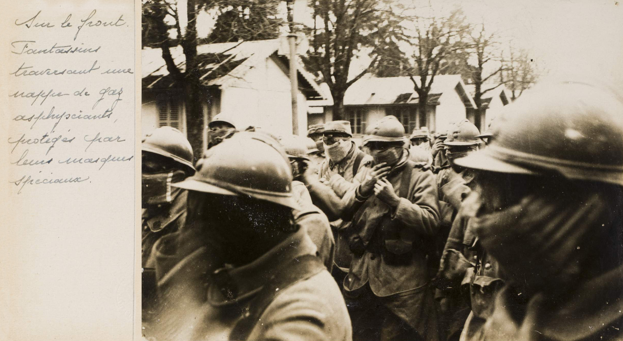 1915 Fronte Francese. Fanti attraversano una nube di gas velenoso, protetti dalle loro maschere speciali.